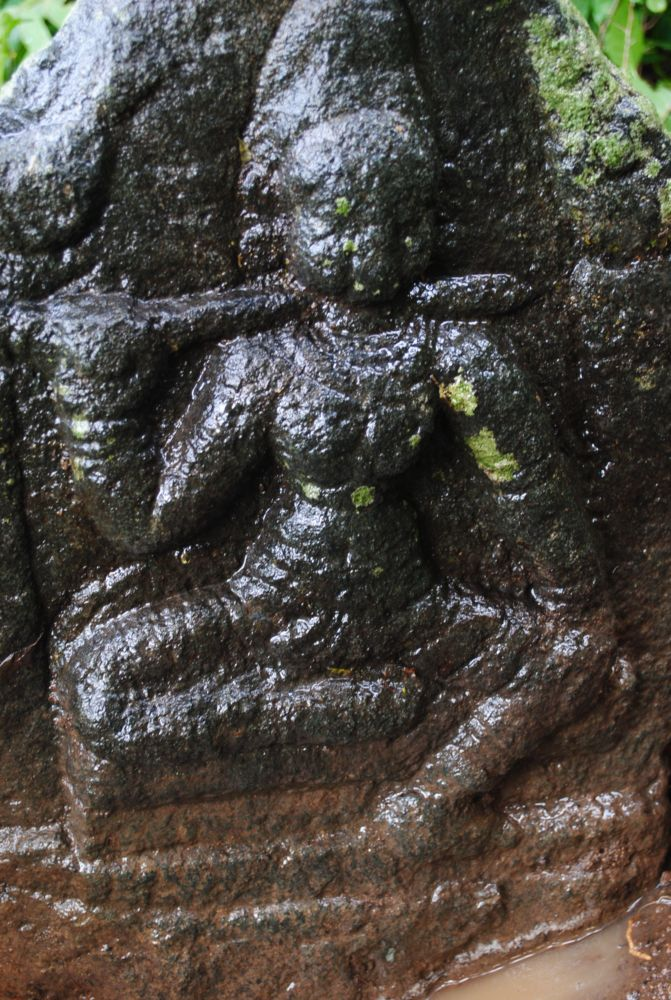 தேவிகாபுரம் தேவரடியார் குளத்தின் கரையில் உள்ள நவகண்டம் நடுகல். அரிய வகை.